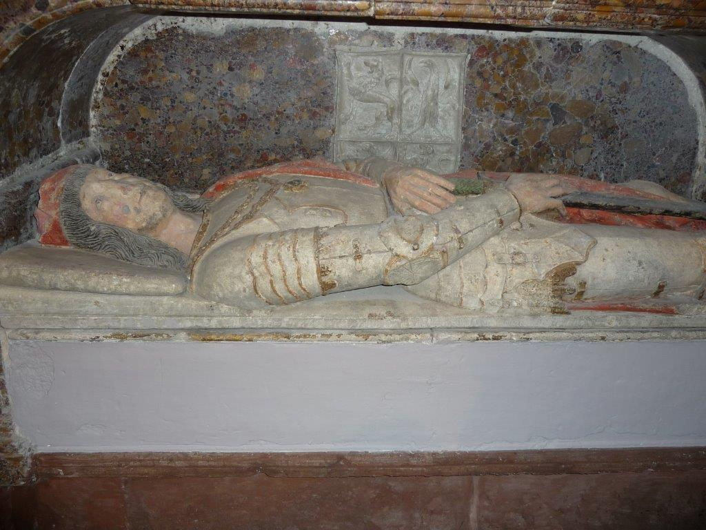 Sepulcro del infante Juan de Castilla, fallecido en 1319 en el Desastre de la Vega de Granada e hijo del rey Alfonso X de Castilla y de la reina Violante de Aragón. Se encuentra actualmente en la capilla mayor de la catedral de Burgos.